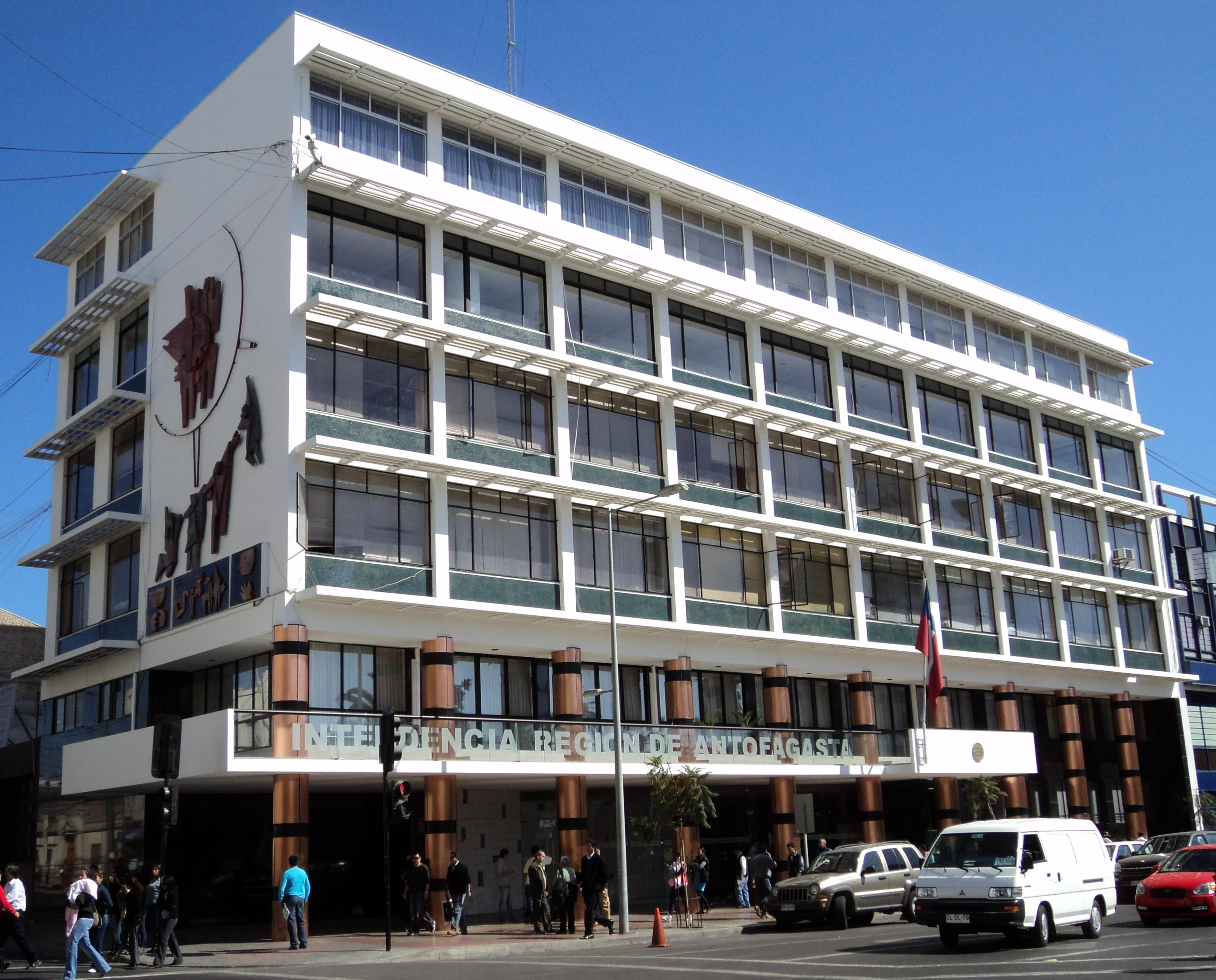 Intendencia Regional de Antofagasta, Chile.